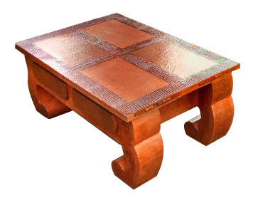 Meuble en carton - V_ro - Table basse